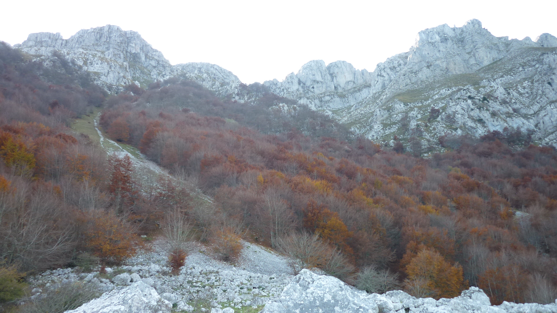 Cara norte de la sierra de Aizkorri al comienzo del Otoño con las Hayas con la hojas de color marrón a punto de caerse